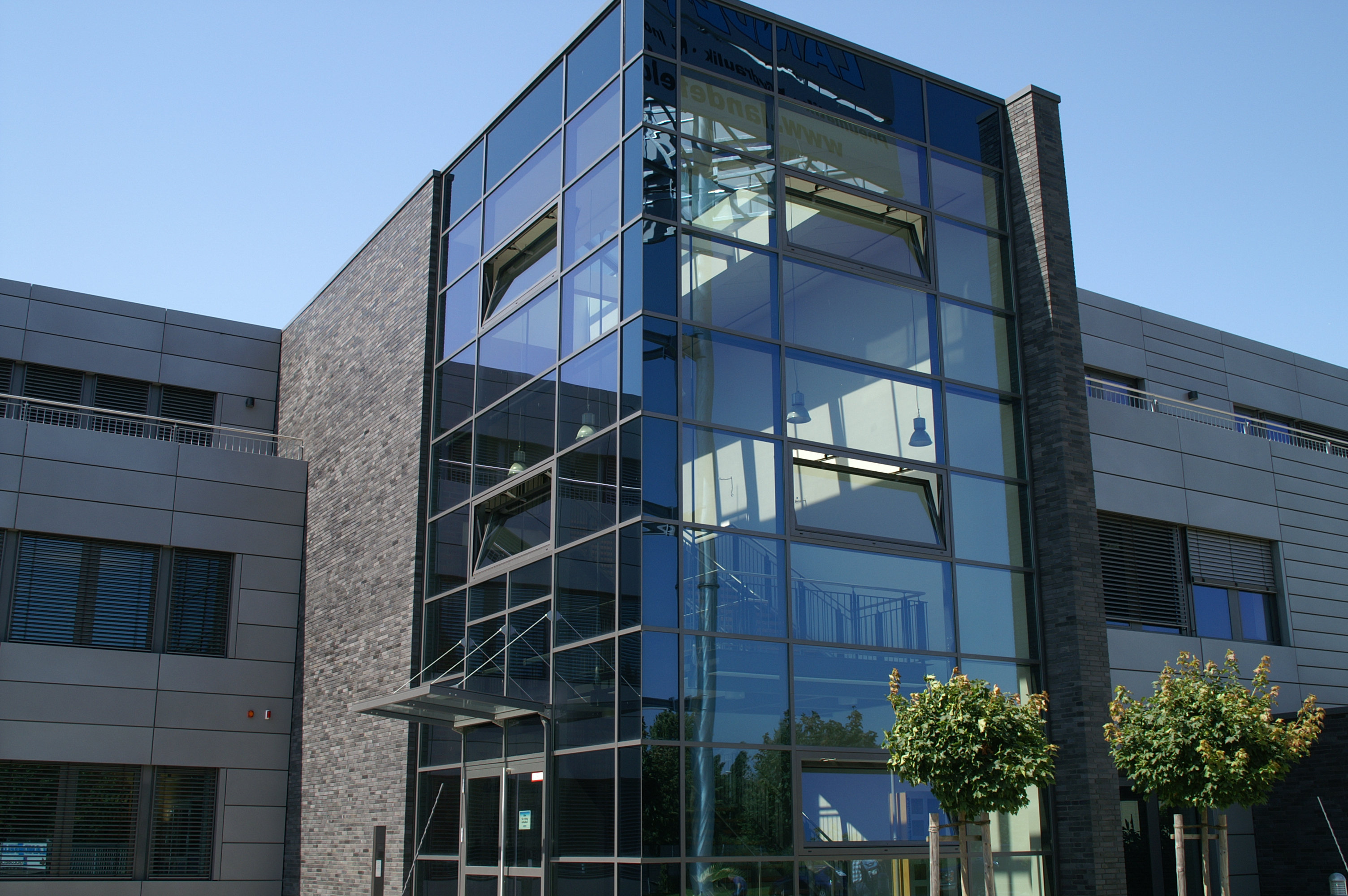 Eingang der Landefeld Druckluft und Hydraulik